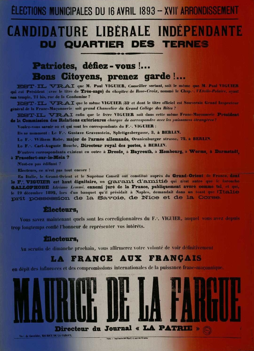 Élection municipale du quartier des Ternes (avril 1893). Affiche tricolore de Maurice de La Fargue.